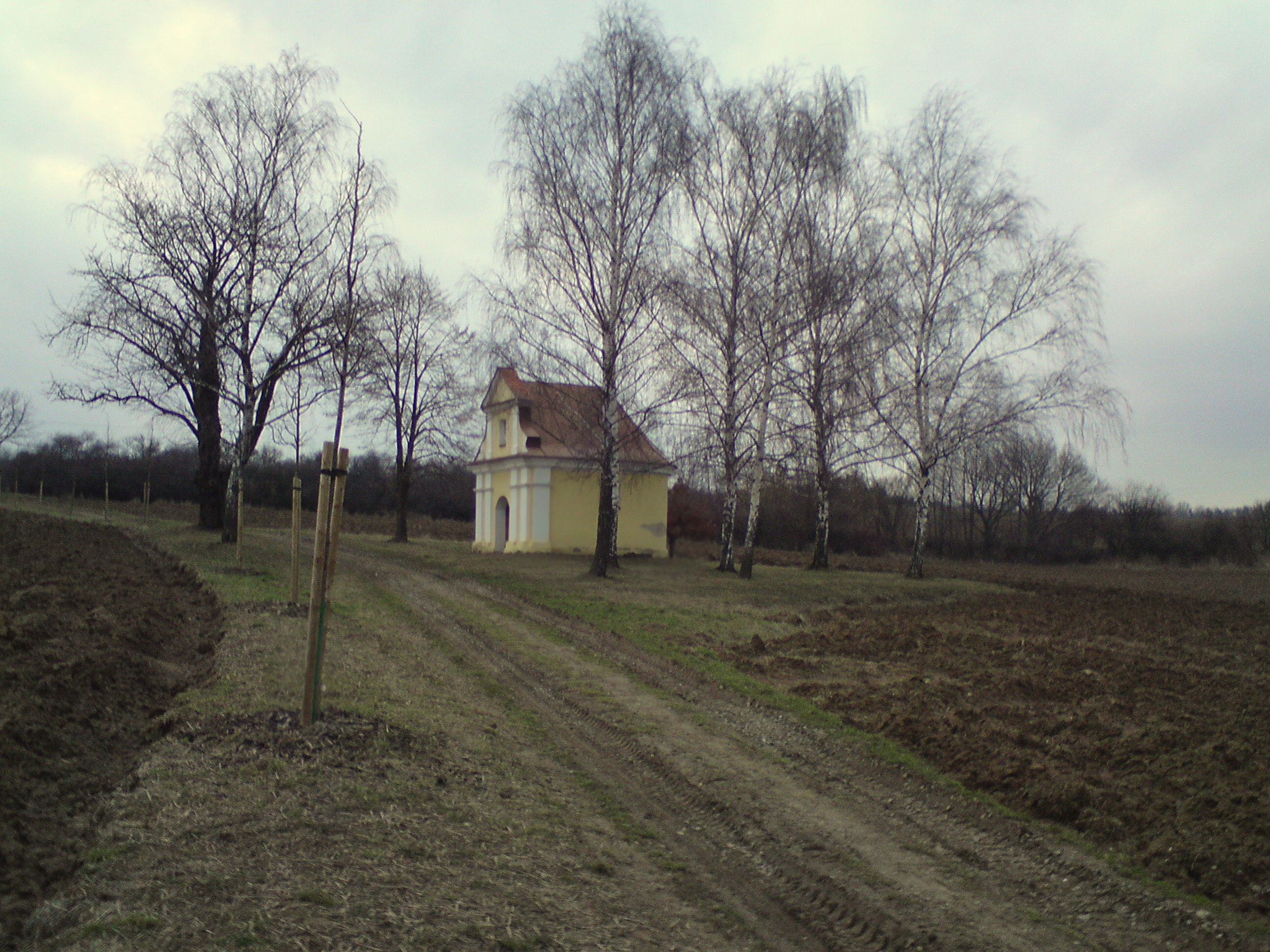 Kaplička za Bukovany u polní cesty ke Svatému Kopečku